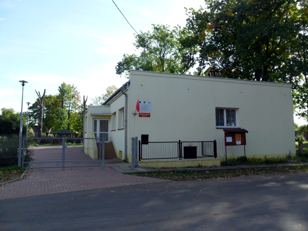 Świetlica w Sękowicach